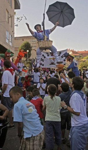 Imagen de la figura de El Brujo bajando de lo alto de la iglesia de Nanclares de la Oca (Álava) durante las fiestas patronales.